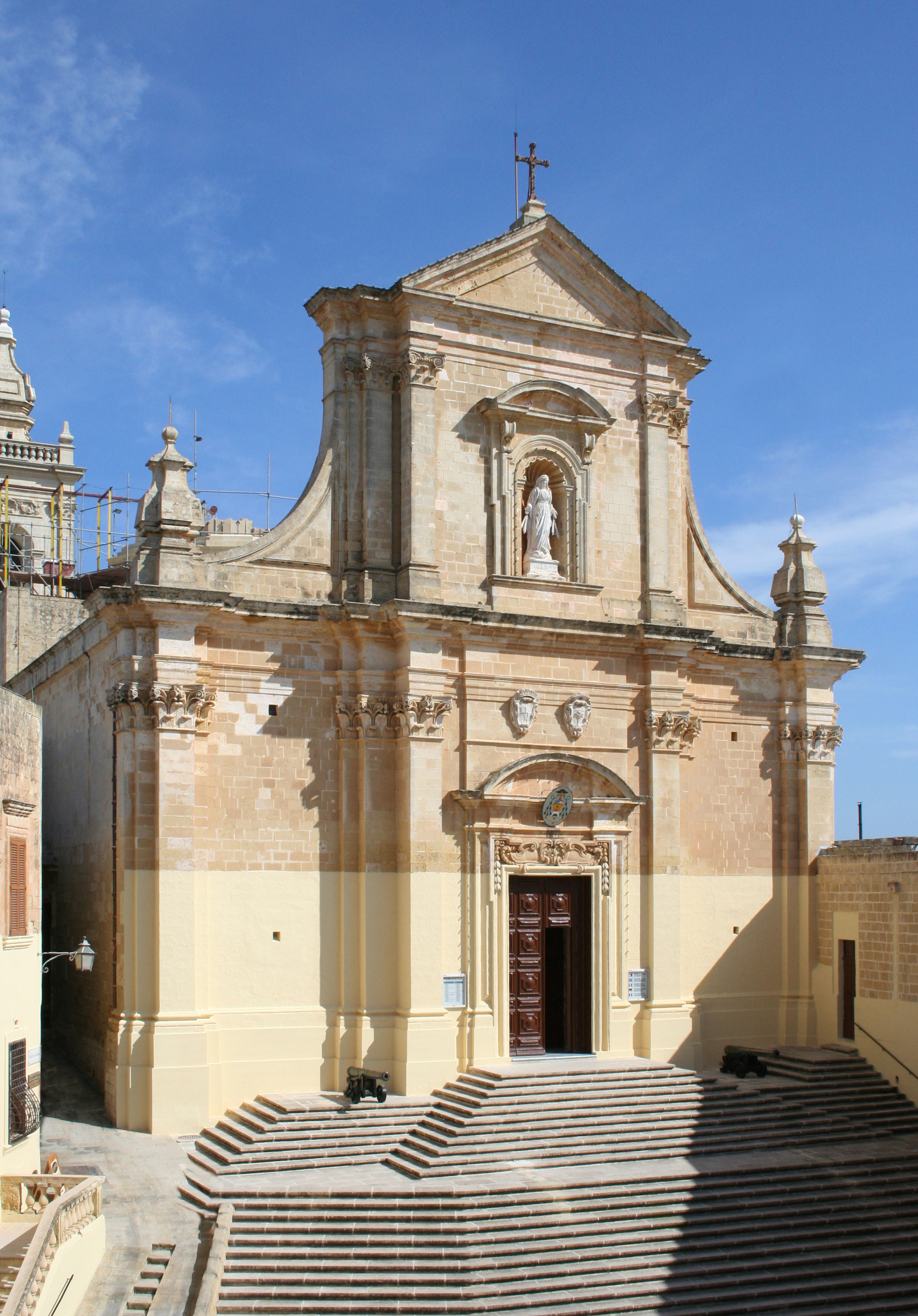 Gozo, Victoria, citadel, cathedral